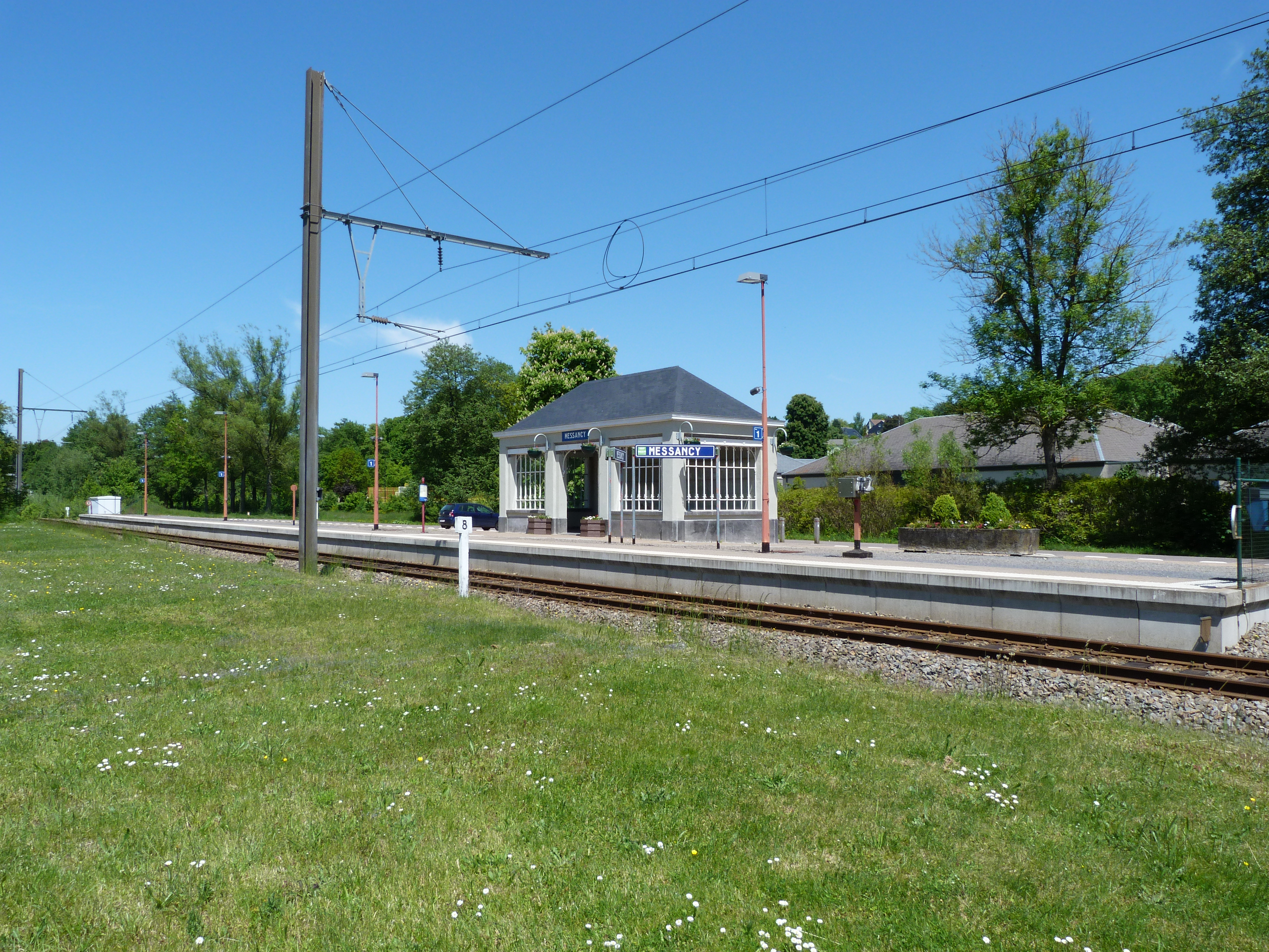 La gare de Messancy en 2013